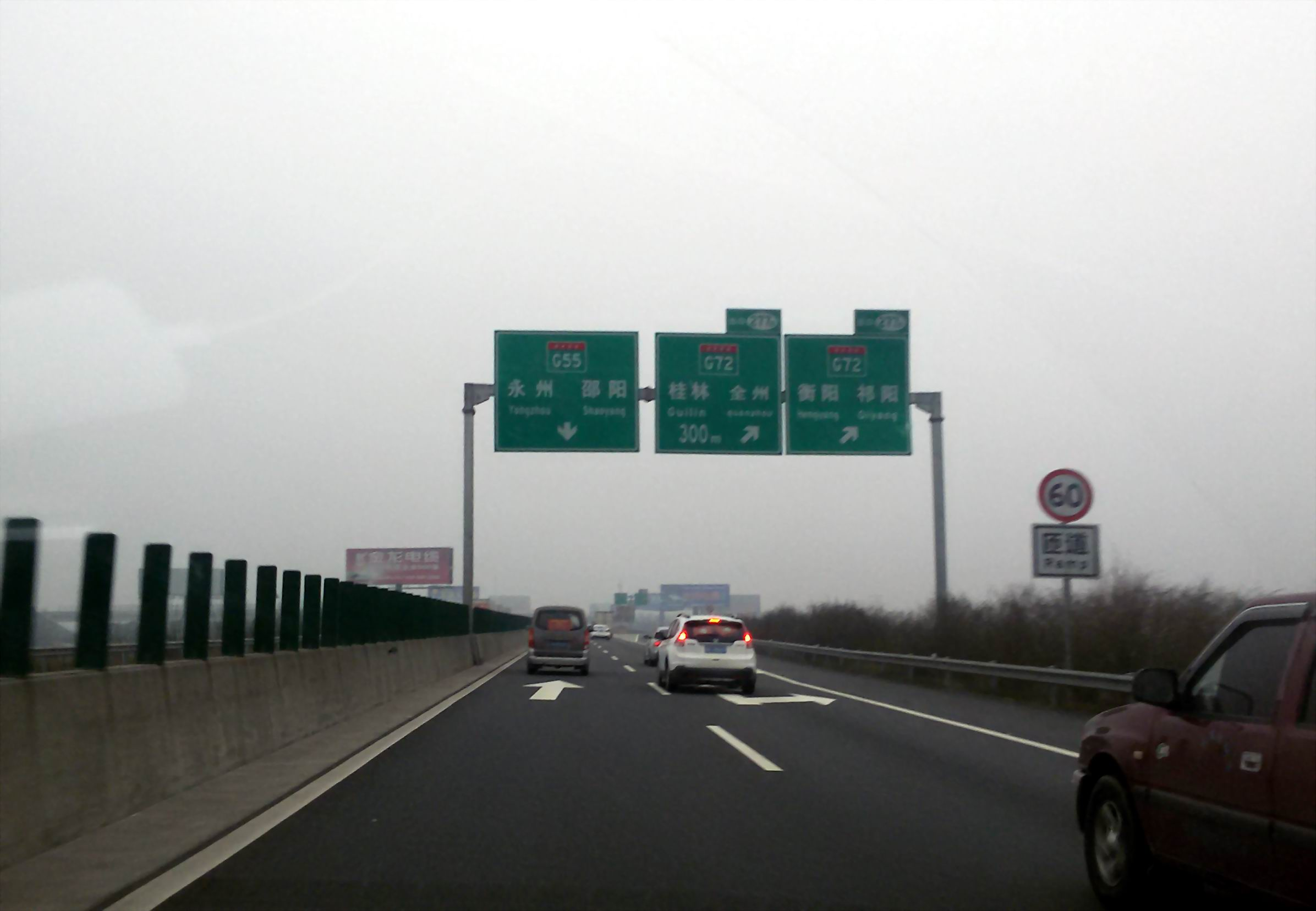 中国高速G55 二连浩特方向 近G72交汇处 277出口